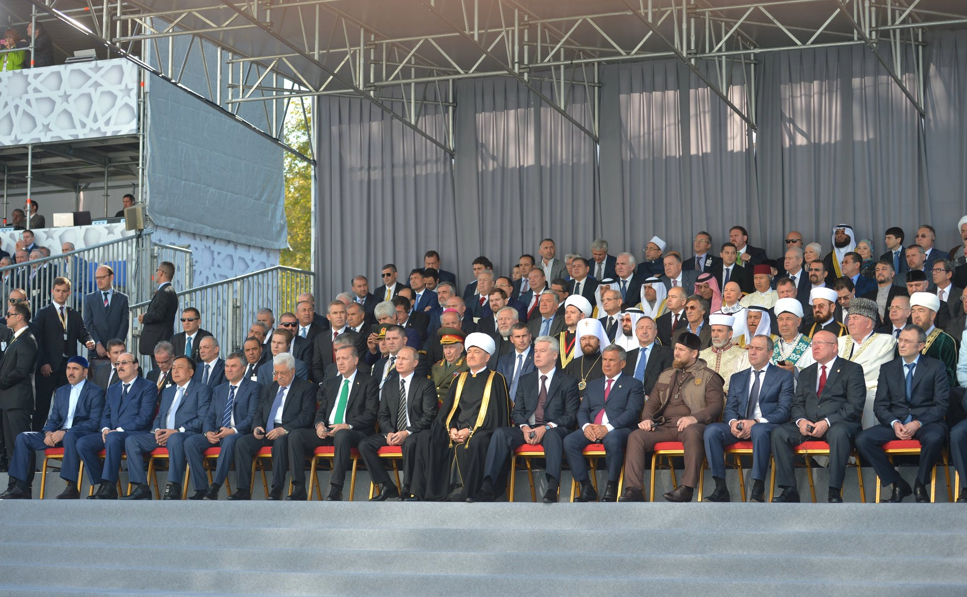 Открытие нового комплекса Московской соборной мечети.